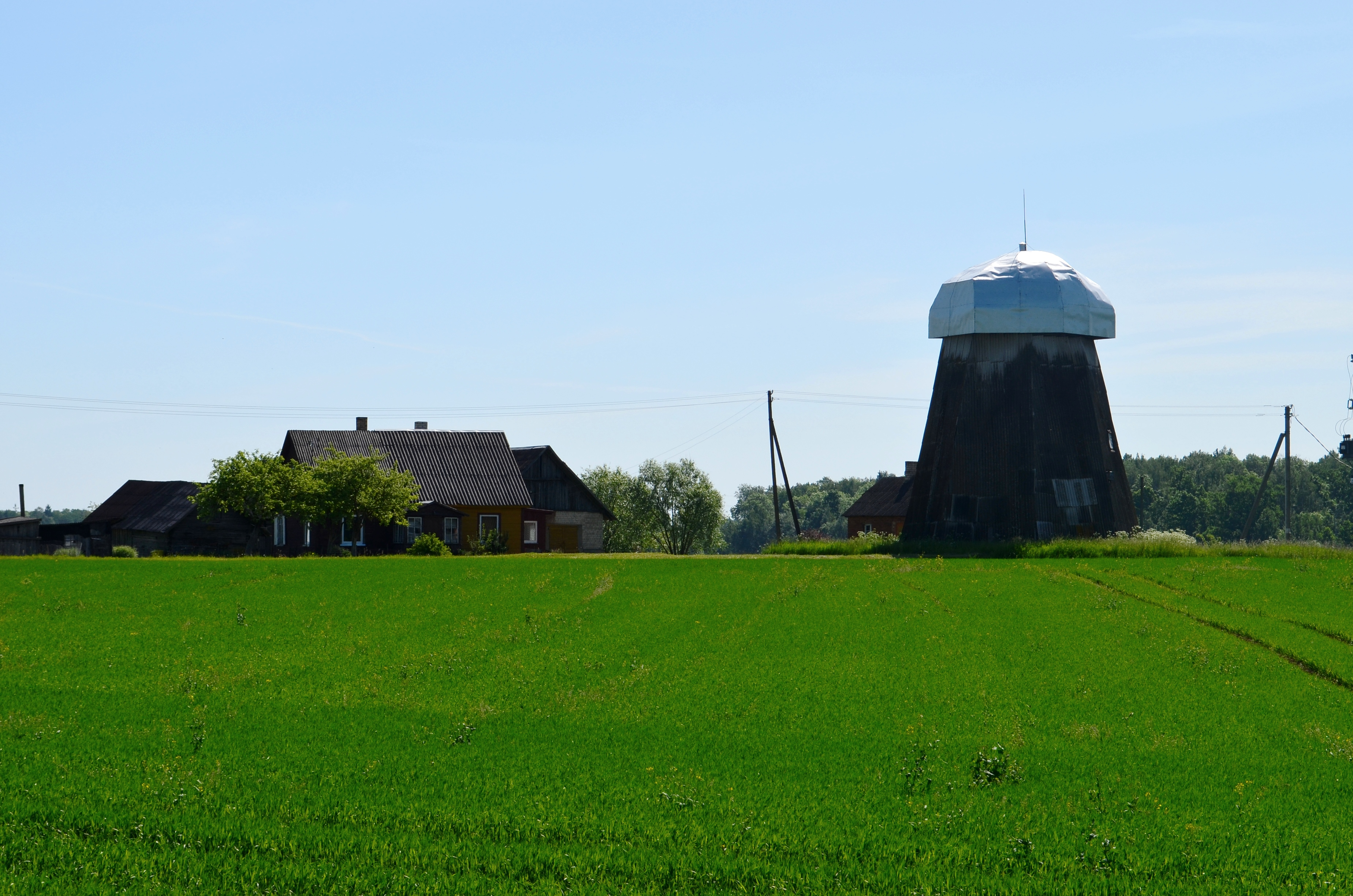 Bačiūnų malūnas, Pakruojo raj.